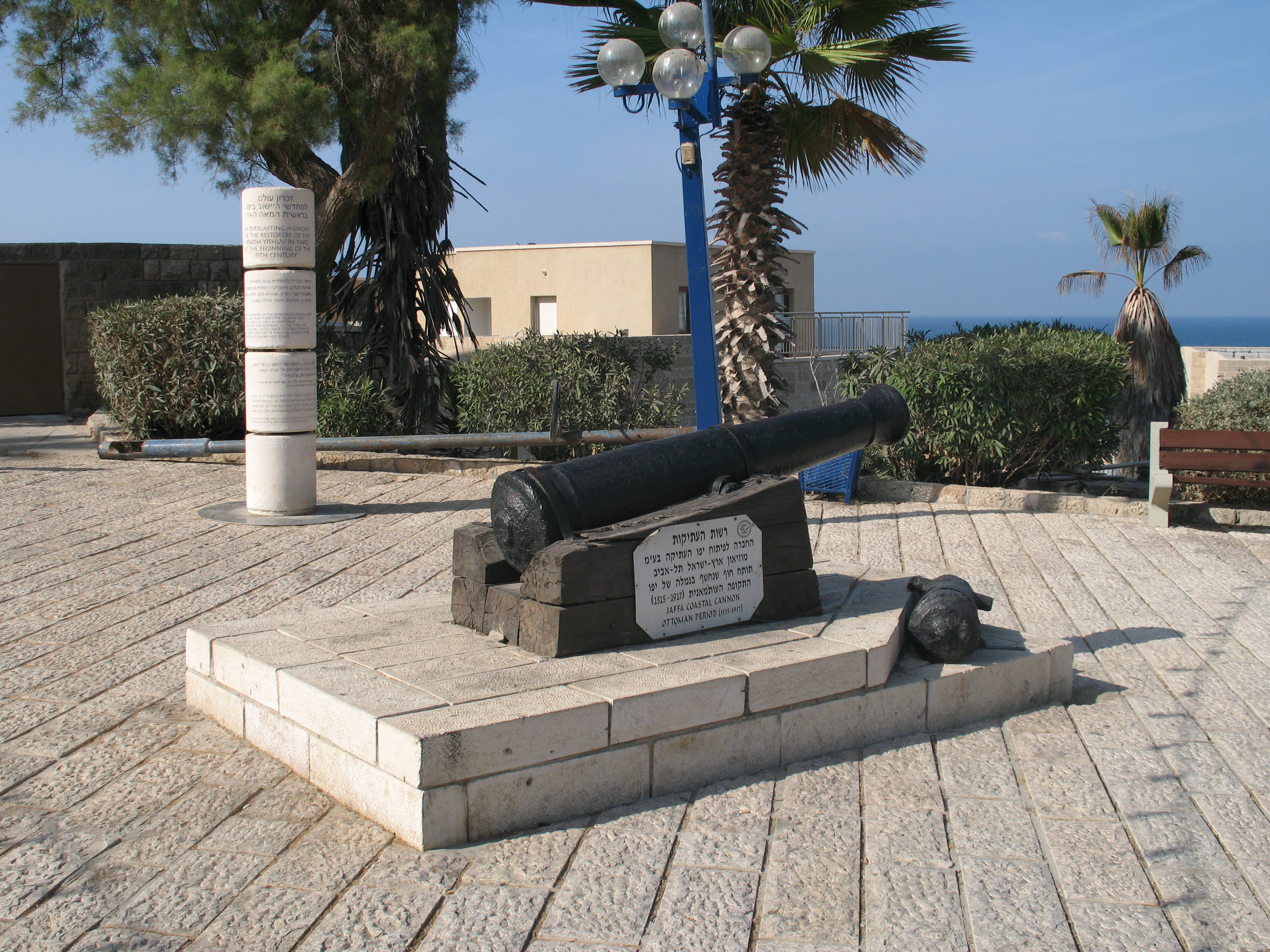 מספר תותחי חופים הובצו ברום תל יפו העתיקה בתחילת המאה ה-19 ע"י המושל העות'מאני של יפו, מוחמד אבו נבוט.